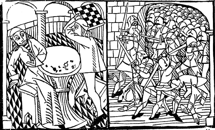 Renaud tue Bertholai. Gravure dans Les quatre fils Aymon (1483-1485) attribué à Huon de Villeneuve, ark:/12148/bpt6k1110648, Bibliothèque nationale de France